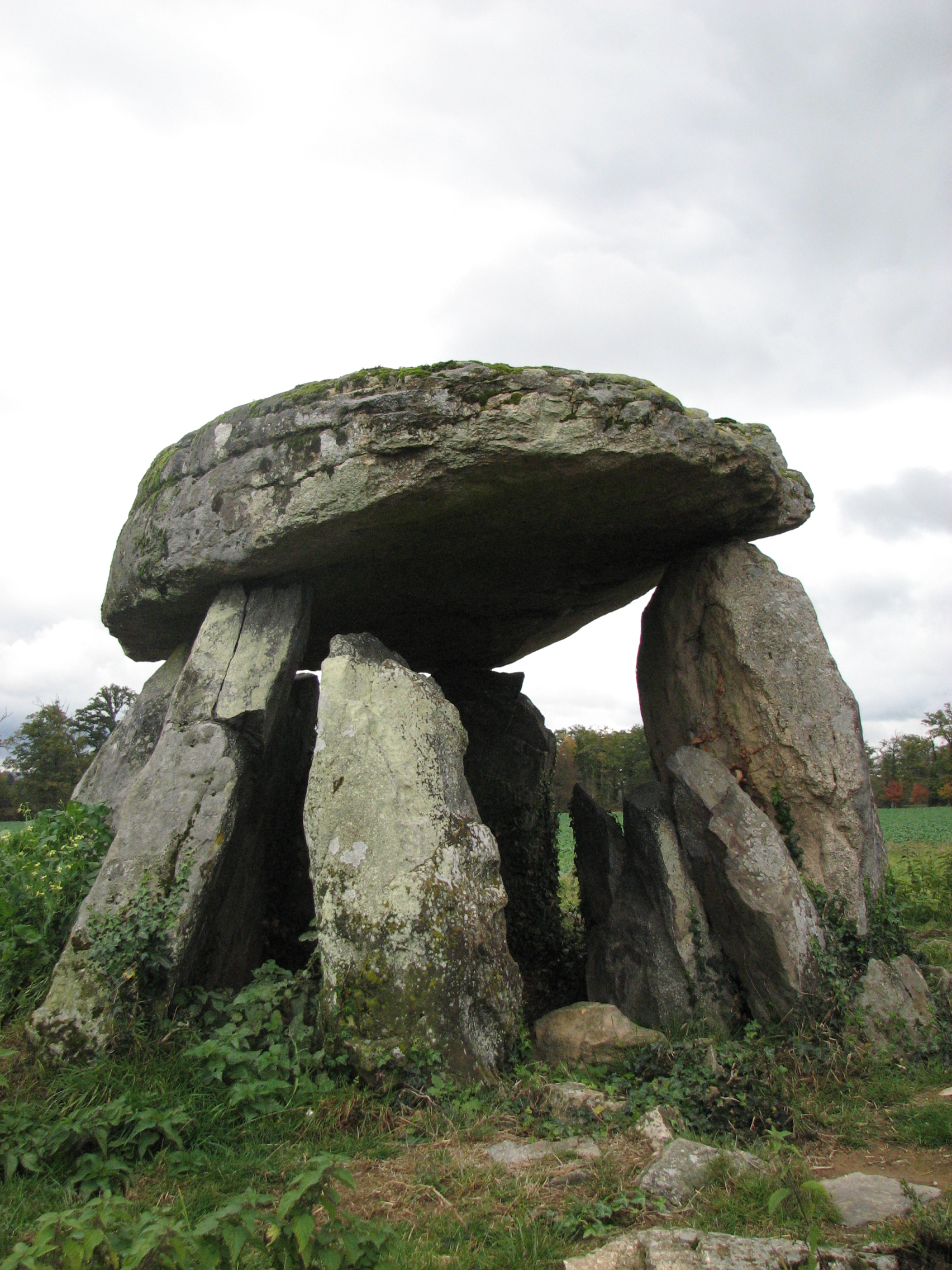 Dolmen de Breuilaufa (Haute-Vienne) (Dolmen de la Betoulle no 2)